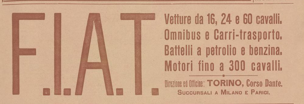 Inserzione pubblicitaria della FIAT apparsa su "Milano e l'Esposizione internazionale del Sempione, 1906" del 1906, Milano, editore F.lli Treves